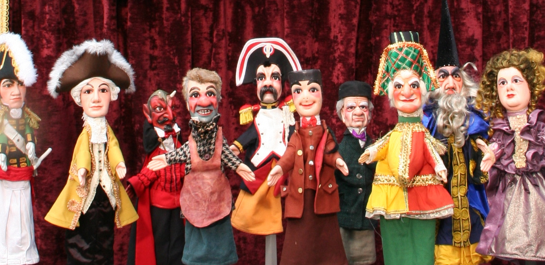 Marionnettes du Guignol guerin de Bordeaux